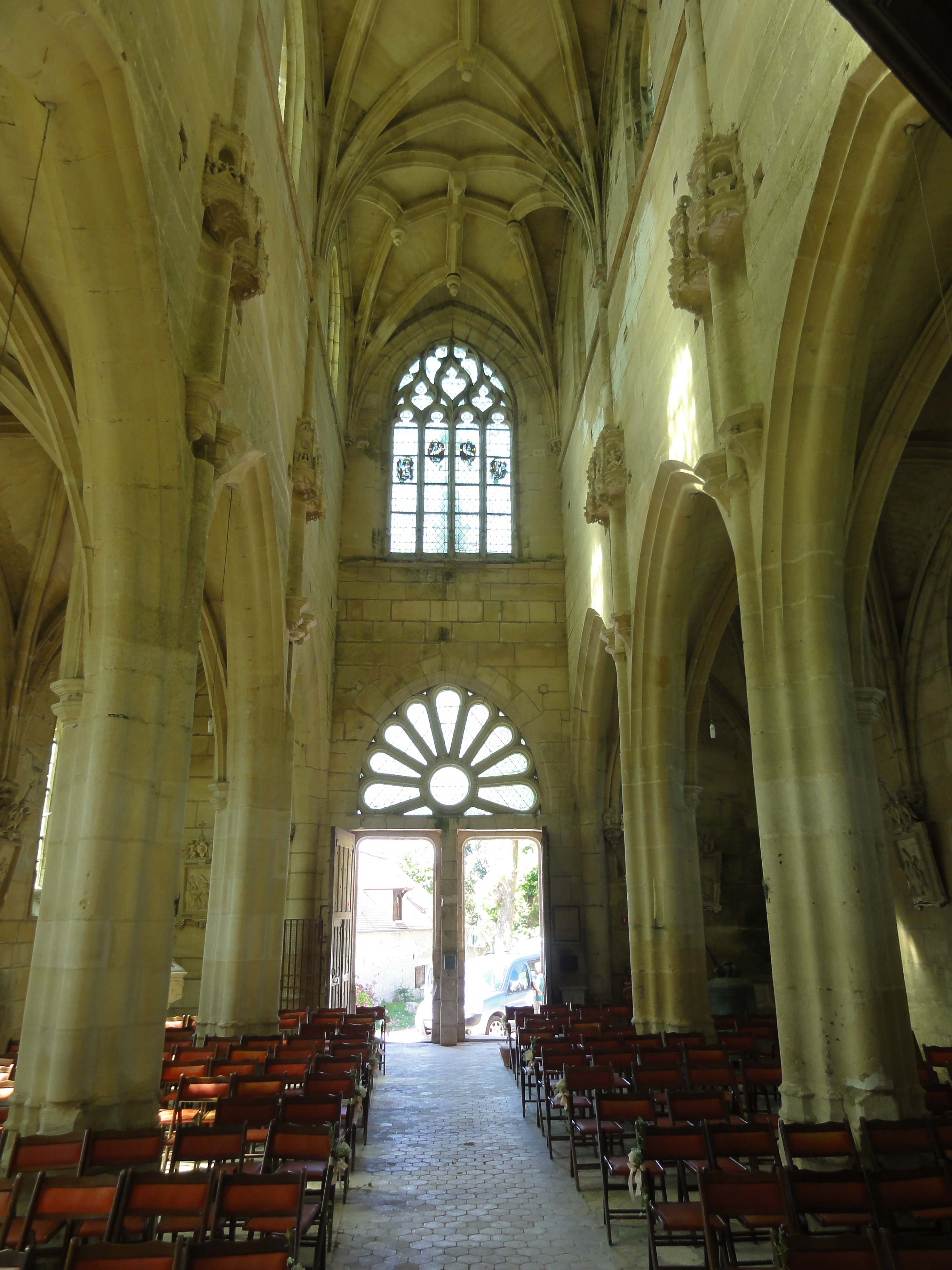 Intérieur de l'église - voir titre.